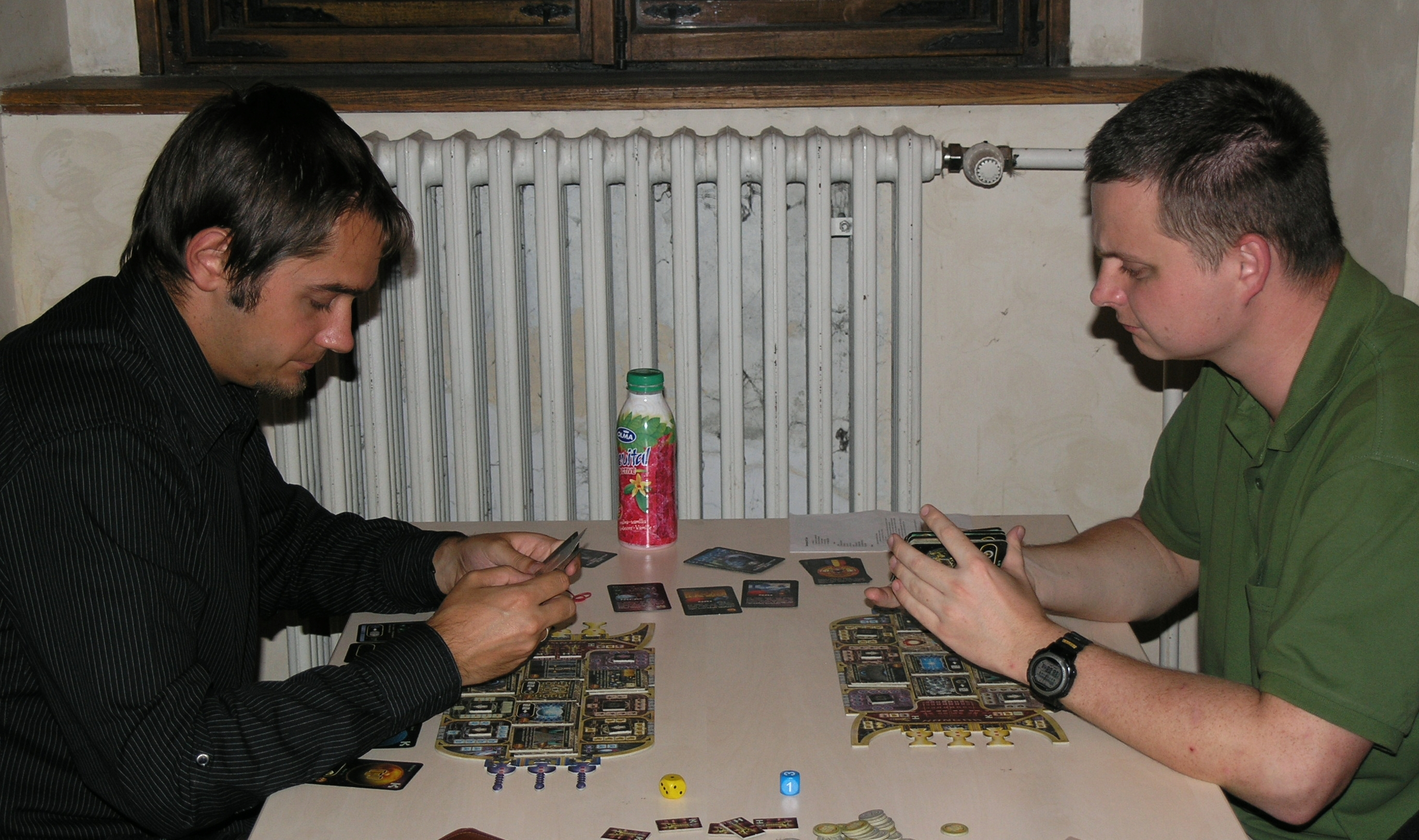 Deskohraní 2008